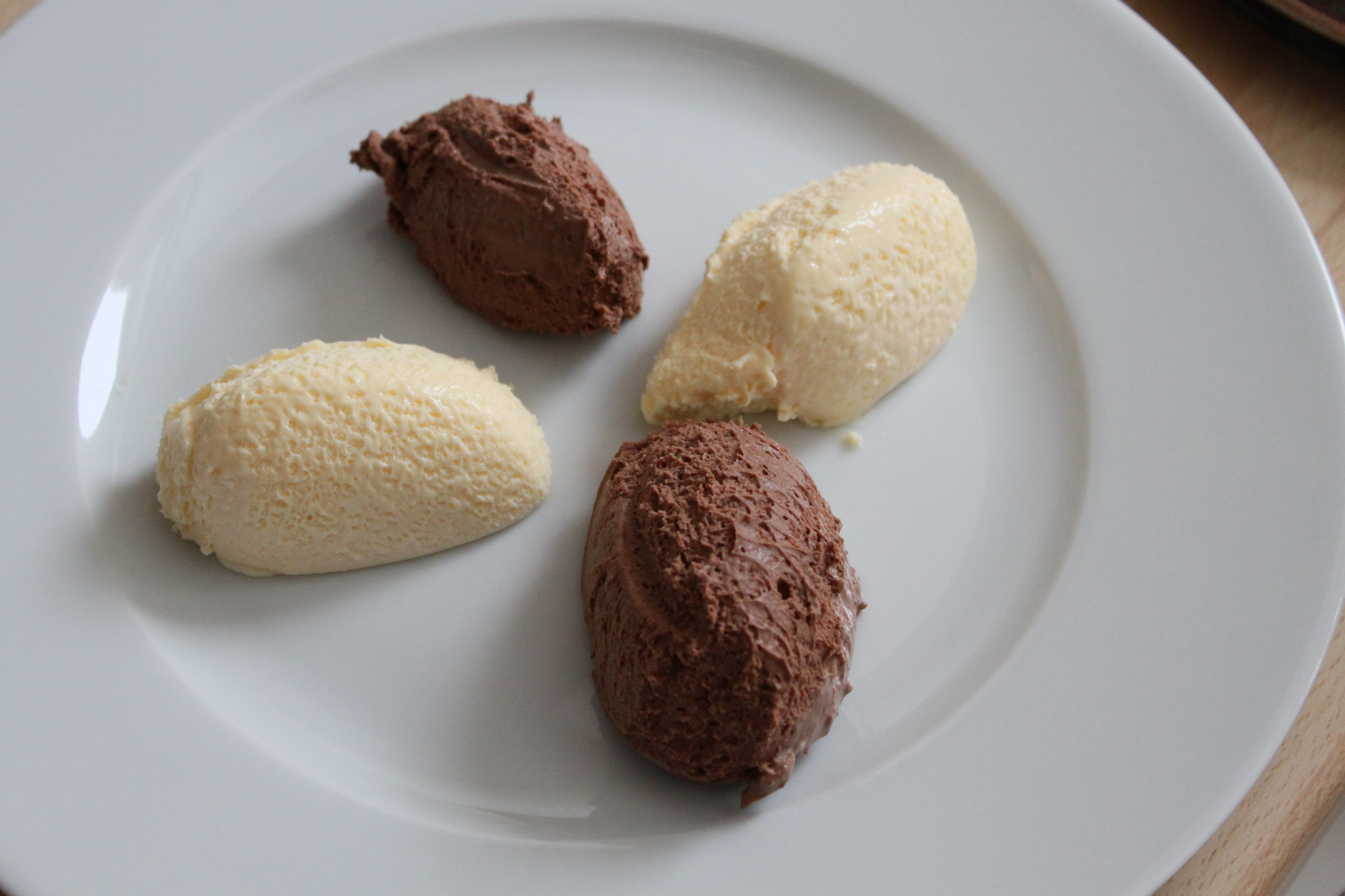 Mousse au Chocolate; und weiße Mpusse